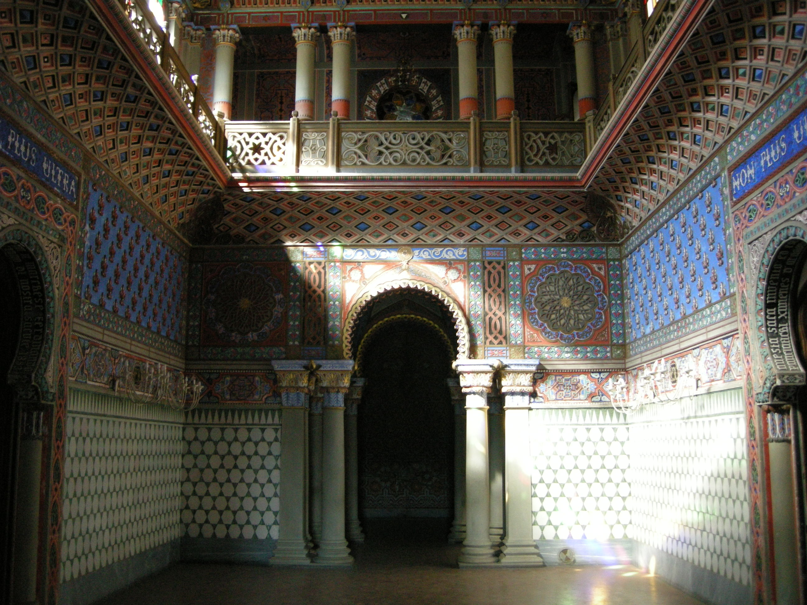 Sammezzano, salone delle colonne